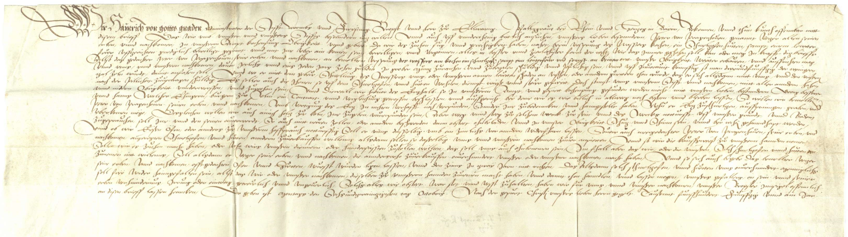 Propst Heinrich von Ellwangen verleiht dem Peter von Pragenhofen, genannt Felzer, im Amt Kochenburg beim Ursprung des Kochers das Recht, einen "Schmelzofen und Leuterfeuer" zu errichten zu Lehen gegen eine jährliche Abgabe von 10 Gulden. Zeile 3-4: … in unserem ampt Kocherburg … naher beim ursprung des Kochen ein schmelzofen, hutten sampt einem leuterfeur uffzerichten …